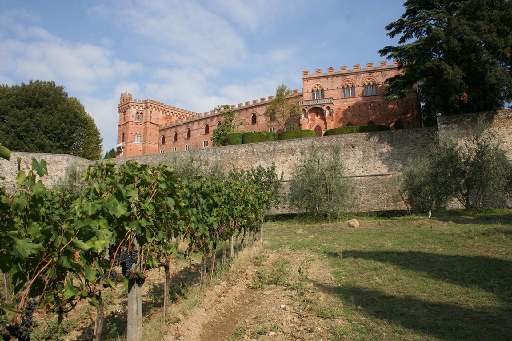 Gaiole in chianti, Toscana, Italia